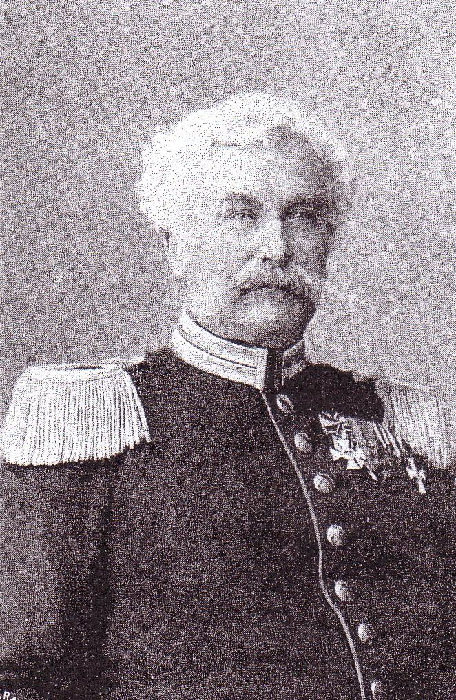 Porträtfotografie von Karl Liebisch (1834-1901)